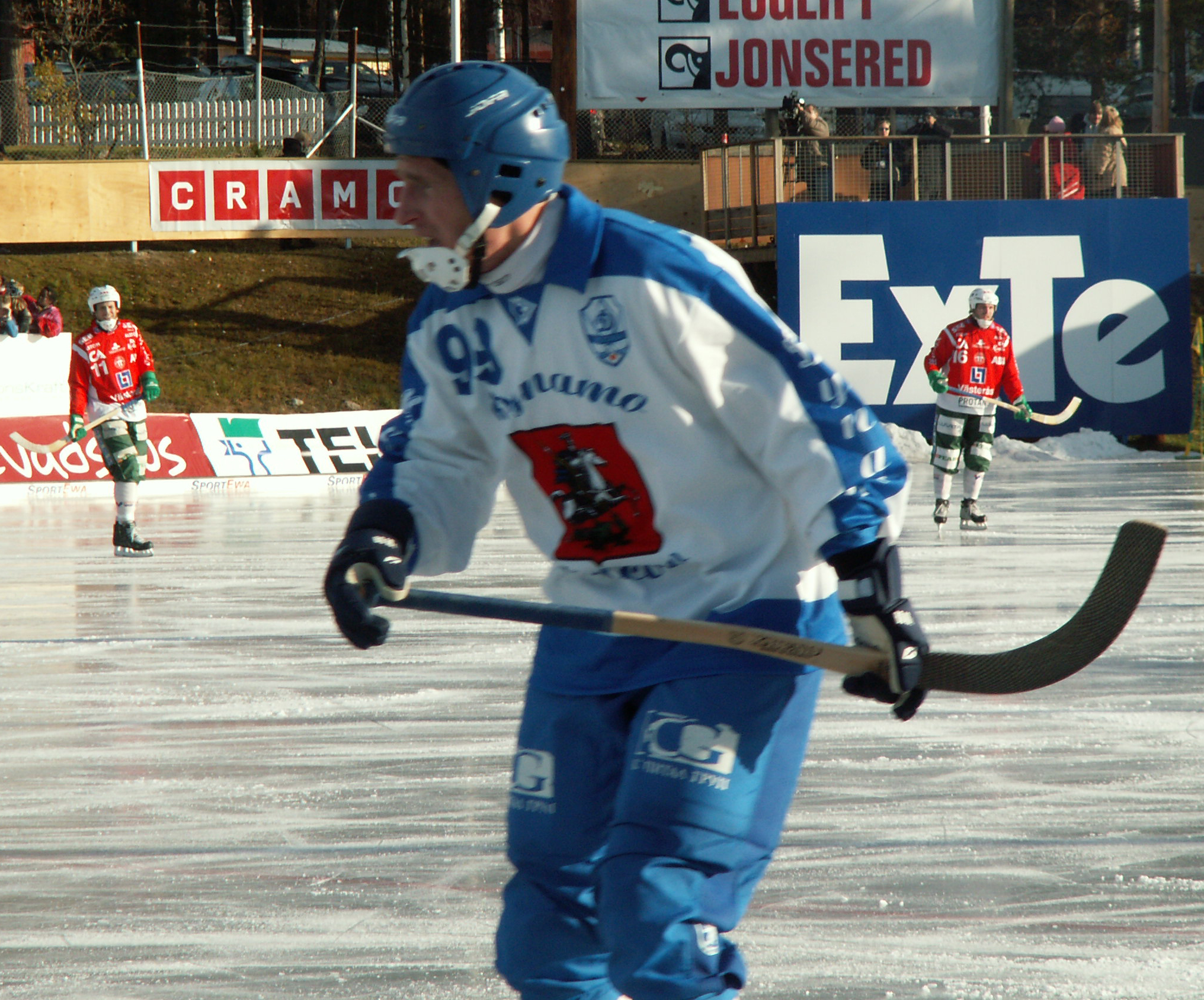 Sergej Obukhov